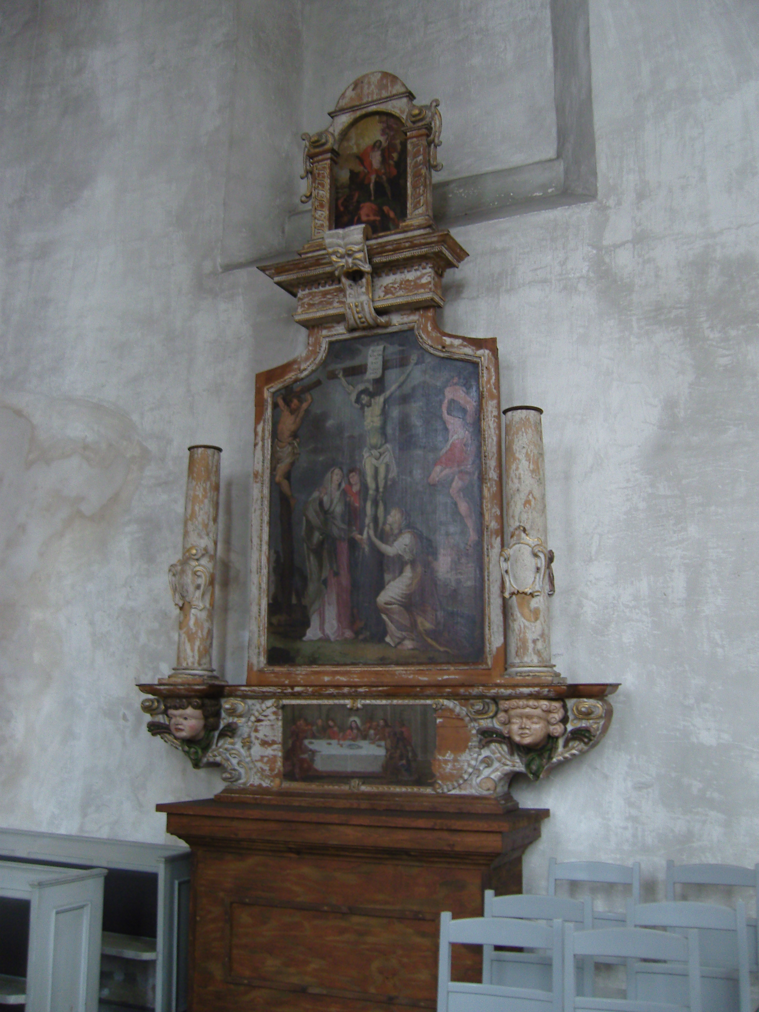 Altar in der Peter-und-Paul-Kirche in Senftenberg. Teil des Barockaltars, der früher in der Wendischen Kirche in Senftenberg stand